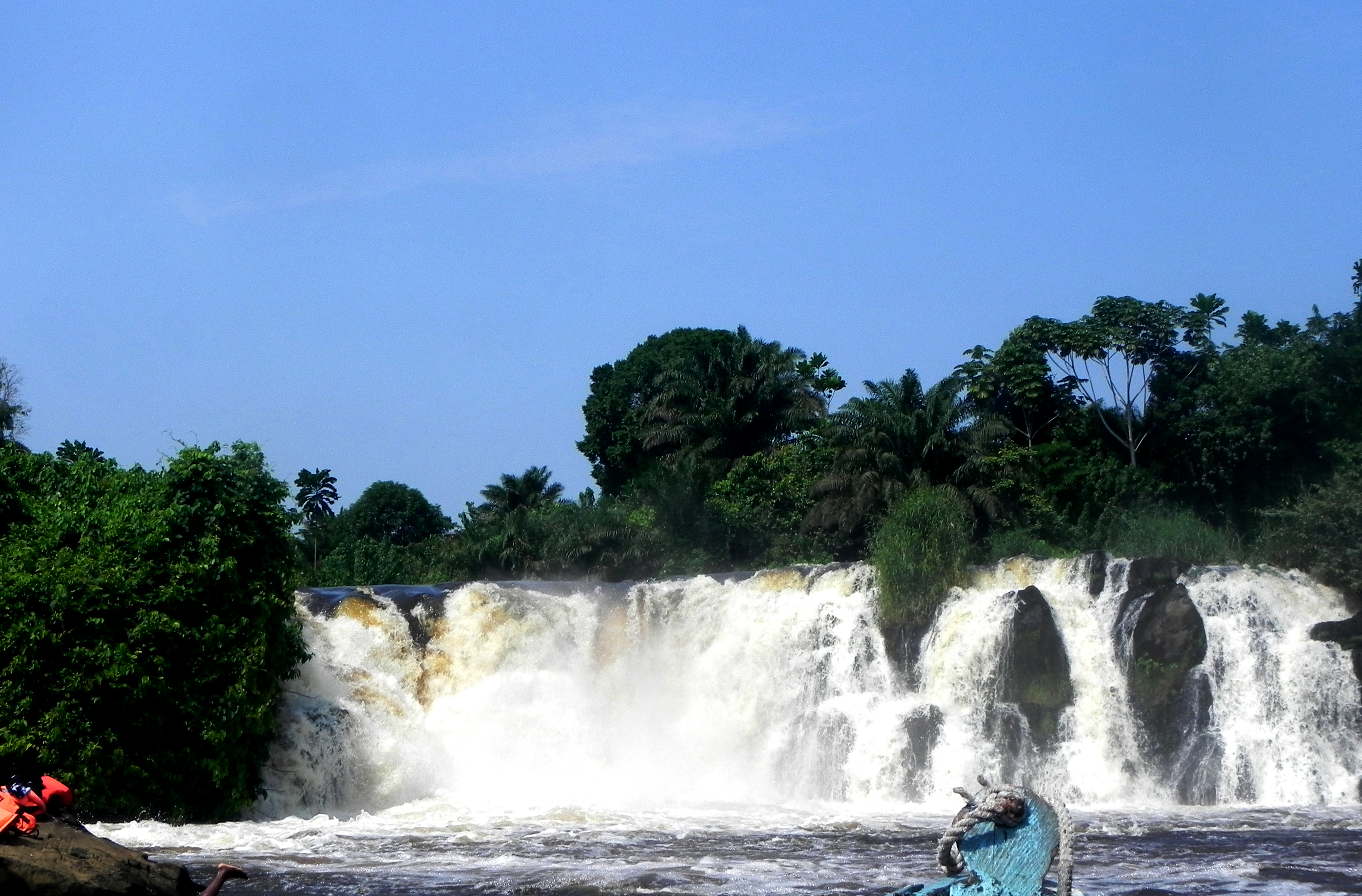 Les chutes de la lobé